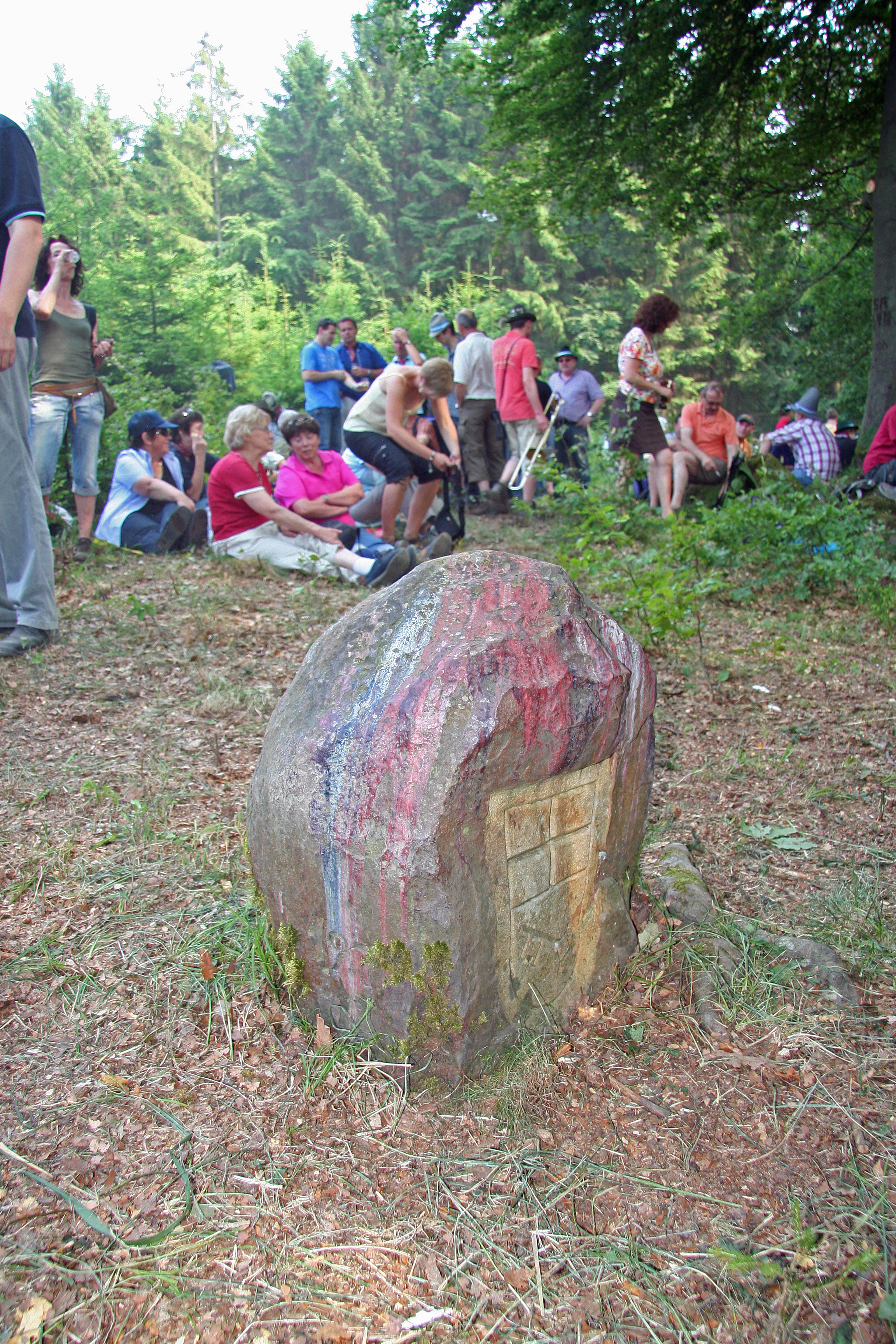 Schnadestein am Lagerplatz "Sommersseite"